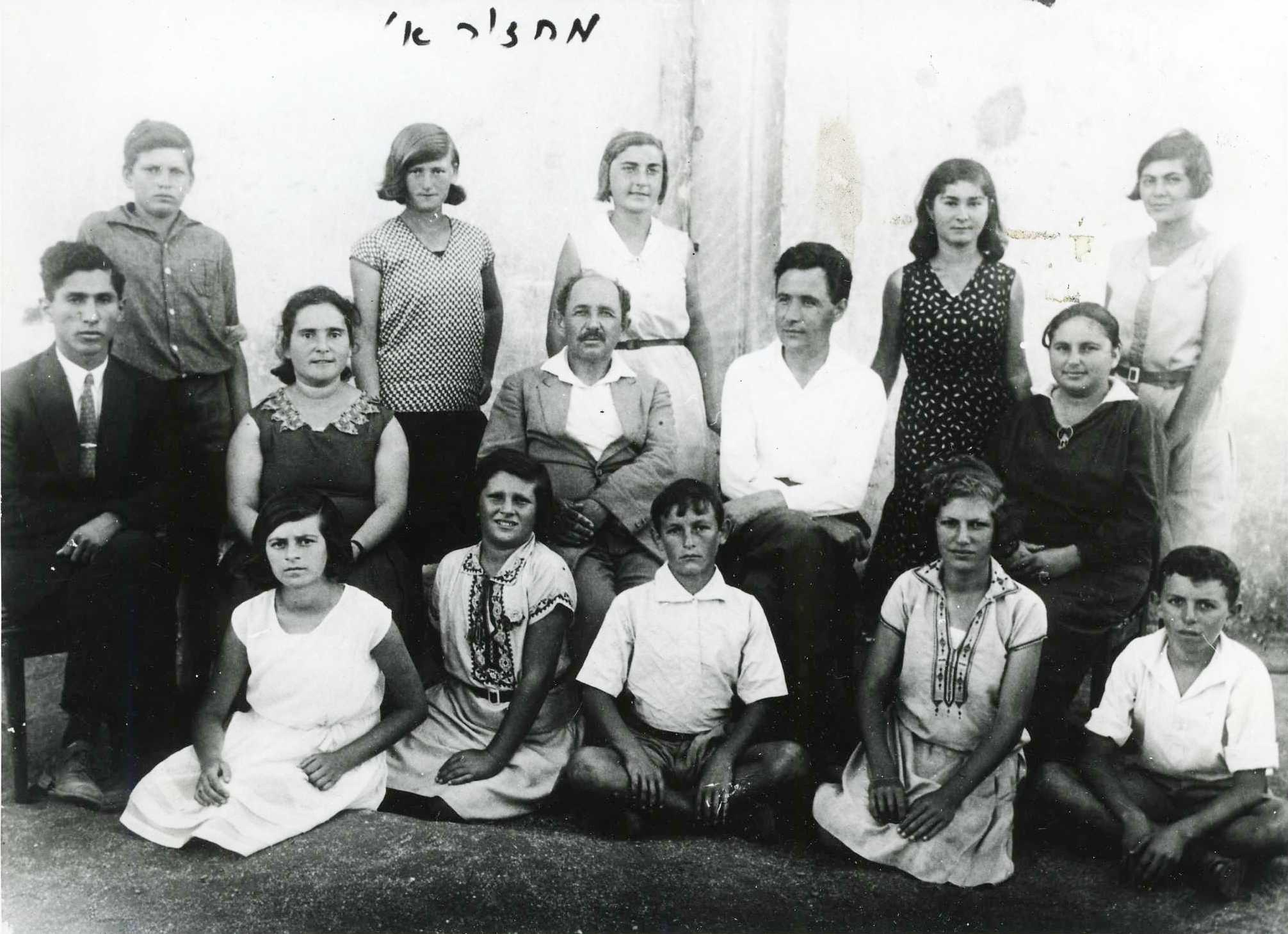 מחזור א' של בית הספר באדיבות אוסף התצלומים של ארכיון בית ראשונים"- מוזיאון לתולדות הרצליה